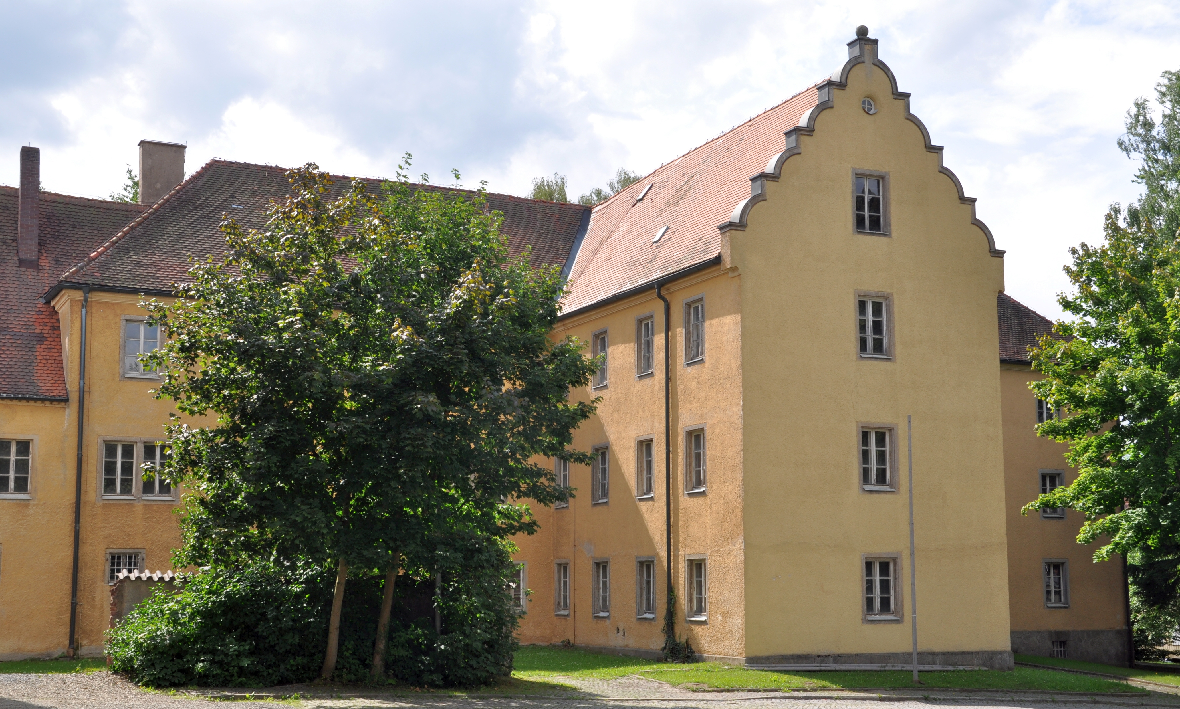 Altes Amtsgericht (bei der Friedrichsburg) in Vohenstrauß (Deutschland)